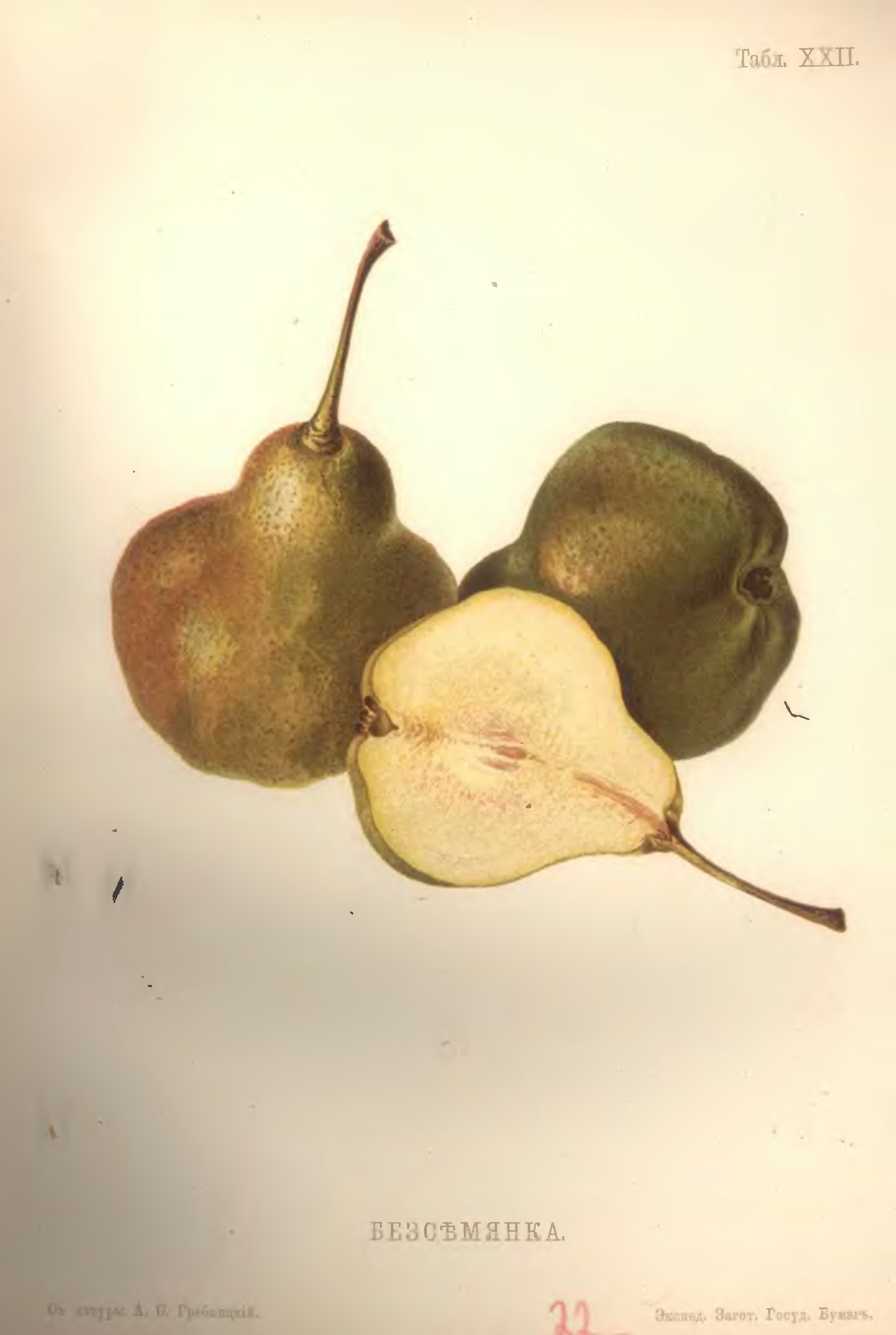 Бессемянка